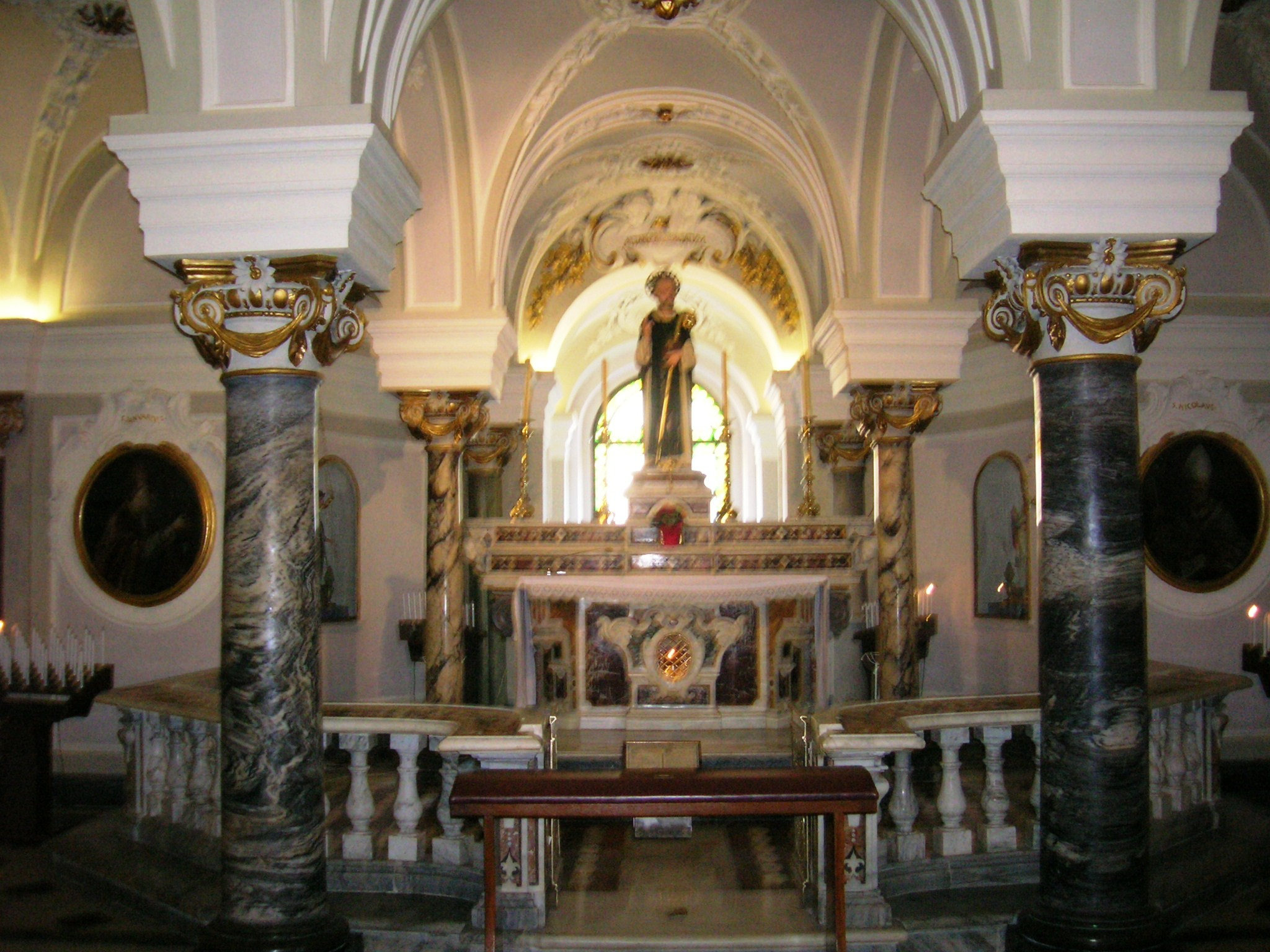 Basilica di Sant'Antonino